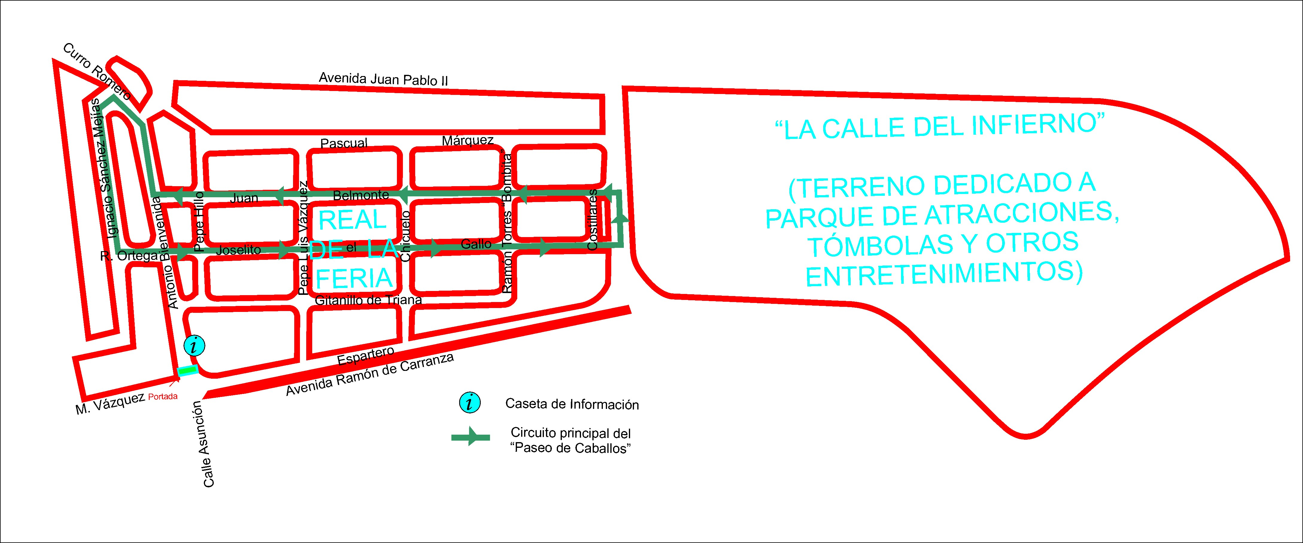 Feria de abril de Sevilla (España). Plano de distribución de "casetas", con "relación de calles" y recorrido previsto para el "paseo de caballos" en el Real de la Feria. Dodo... es un trabajo de elaboración propia.